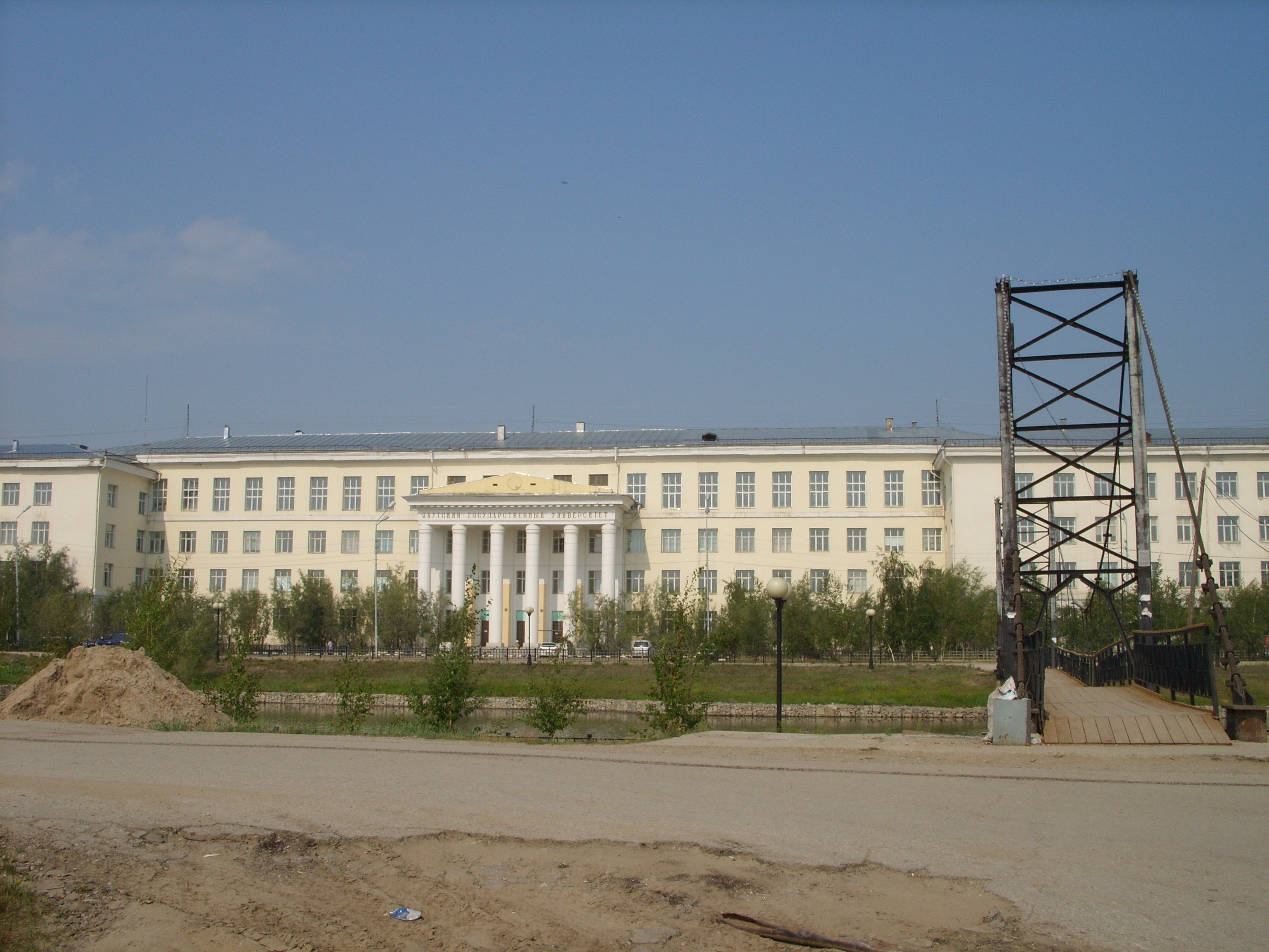 Северо-Восточный федеральный университет (ранее - Якутский государственный университет). Здание 1957 года постройки. Исторически это первый корпус ЯГУ, с постройкой других стал называться традиционно "главным корпусом". В настоящее время здесь располагаются в основном технические факультеты. Гуманитарные - рядом, в УЛК (учебно-лабораторном корпусе).